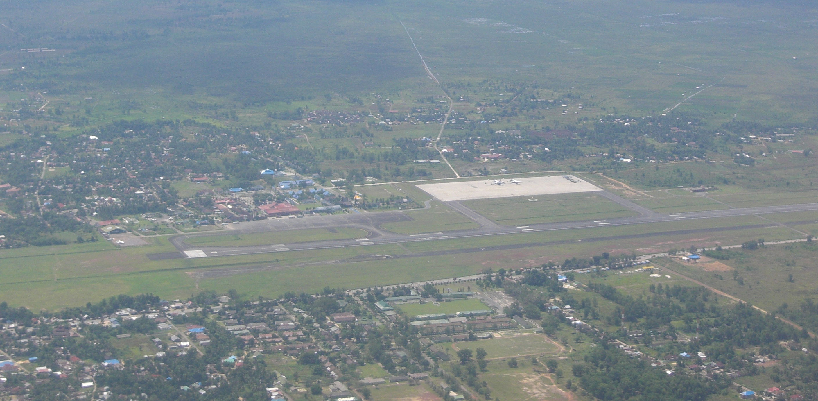 Syamsuddin Noor Bird Eye View